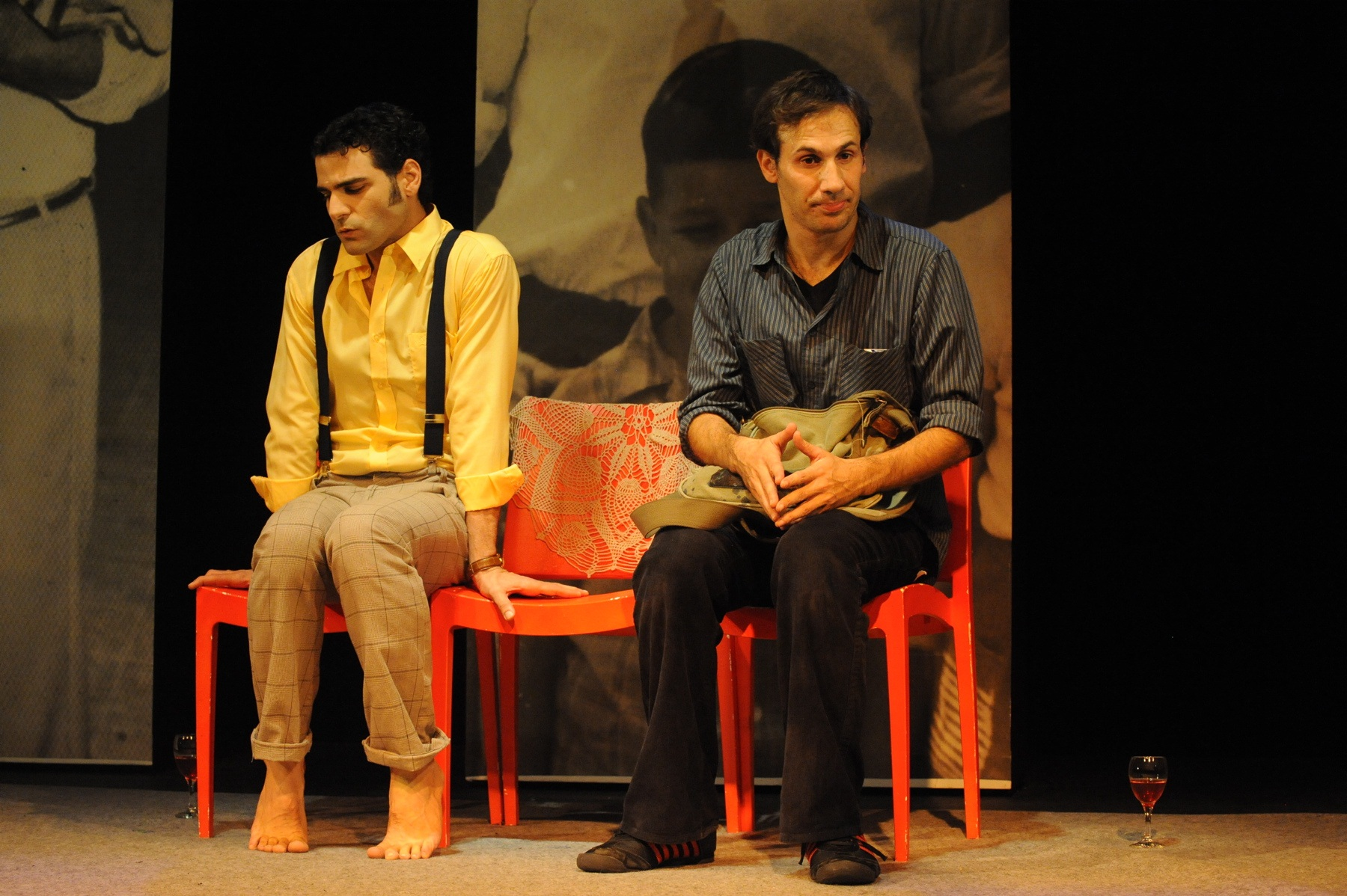 קטע מביך